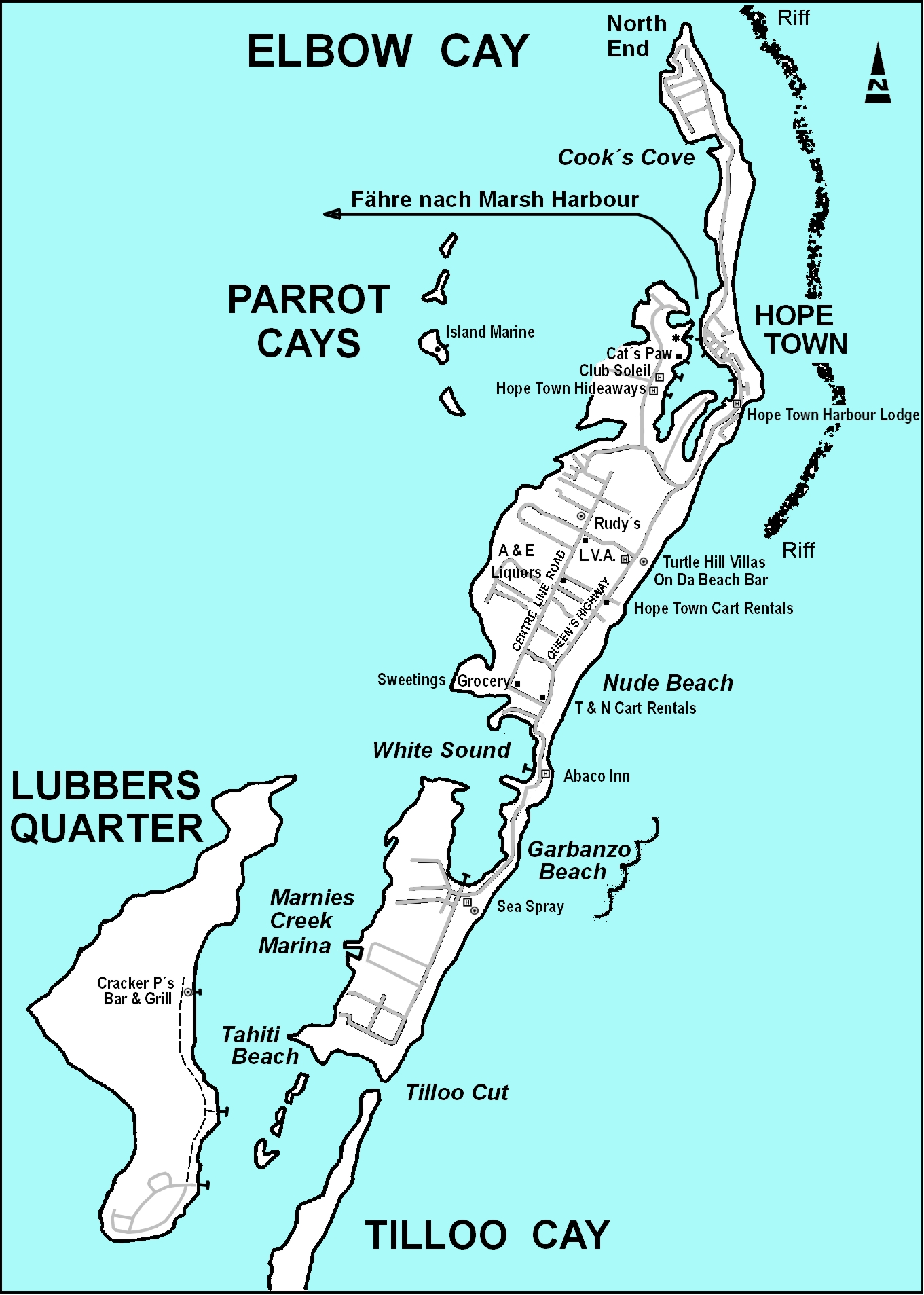 Karte von Elbow Cay, Abacos, Bahamas